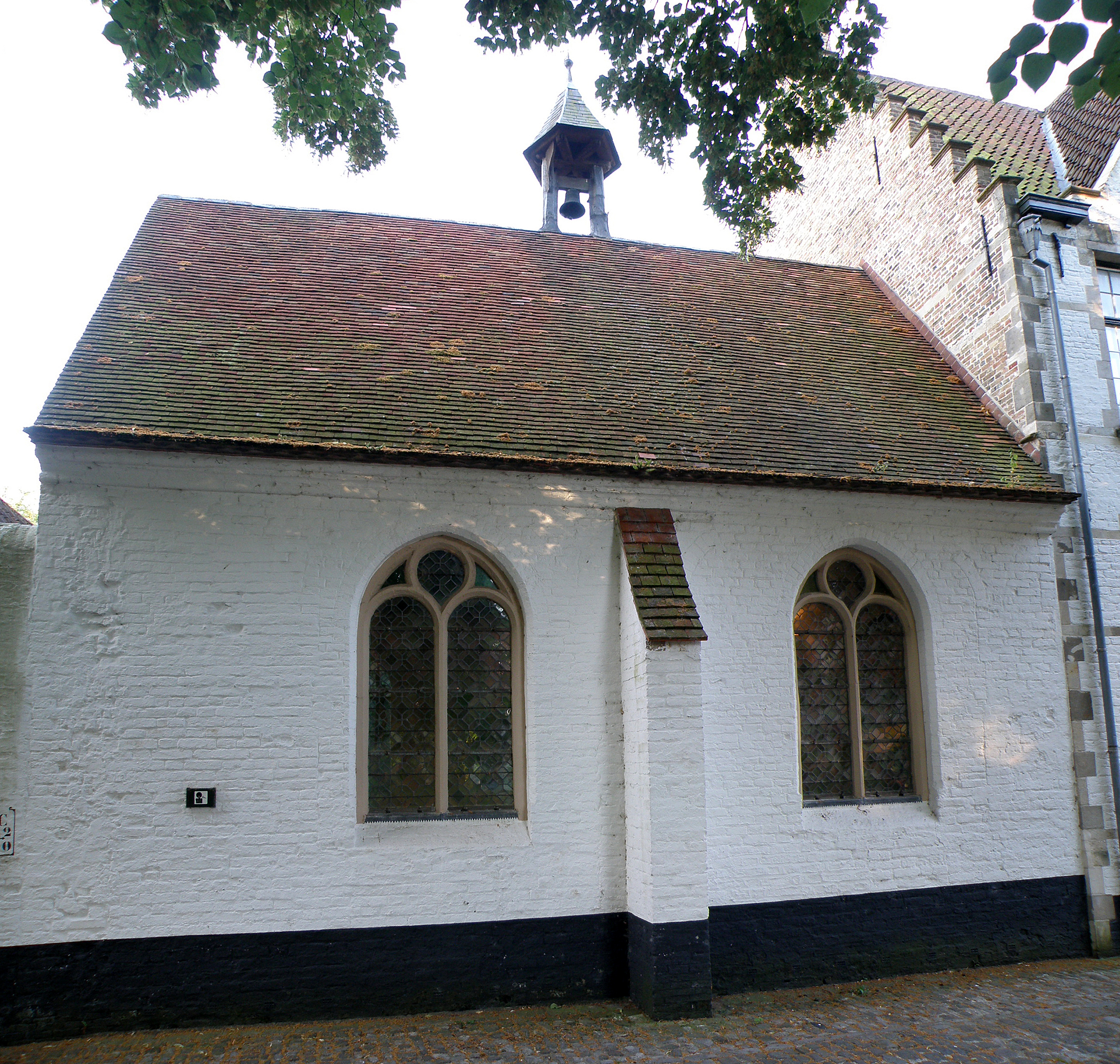 Begijnhof (Brugge). Huiskapel bij huis grootjuffrouw (nr. 30).